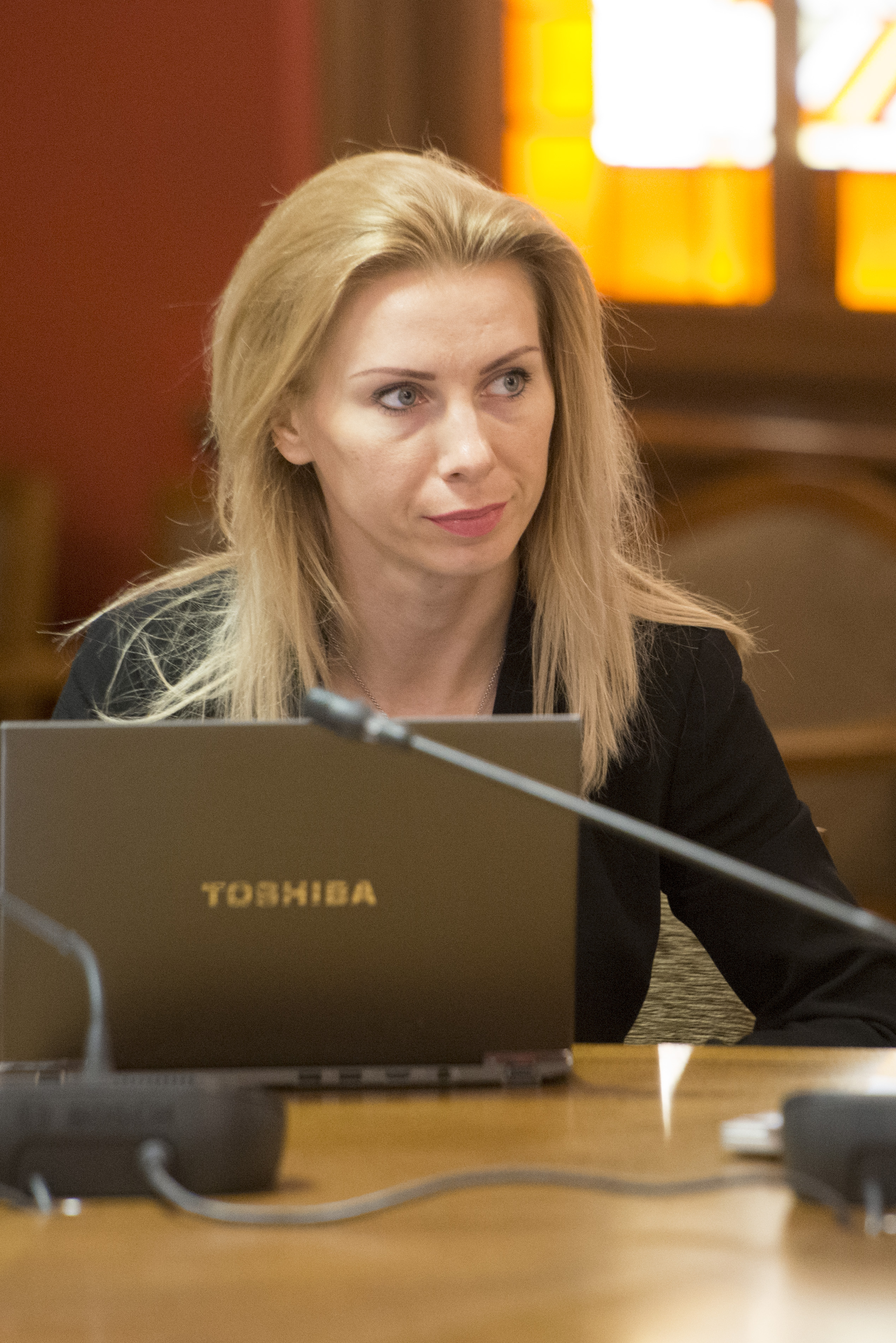 2015.gada 22.aprīlis. Publisko izdevumu un revīzijas komisijas sēde. Foto: Reinis Inkēns, Saeimas Kanceleja Izmantošanas noteikumi: saeima.lv/lv/autortiesibas